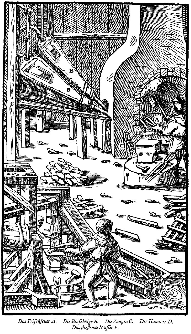 Schmiede